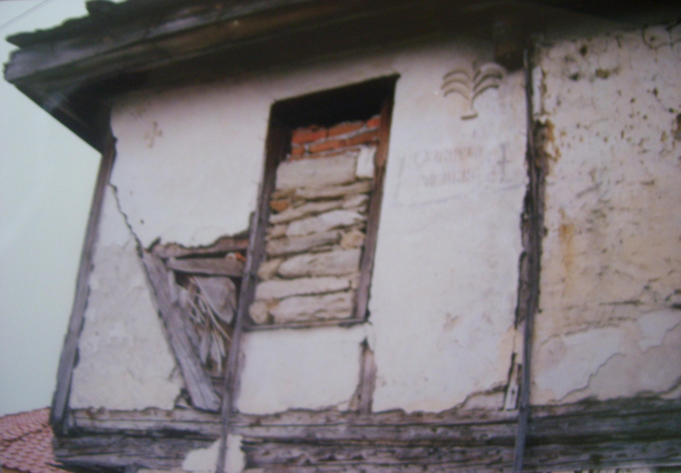 Сградата на старото българско училище в Сатовча, България. Надписът гласи "Българско училище".